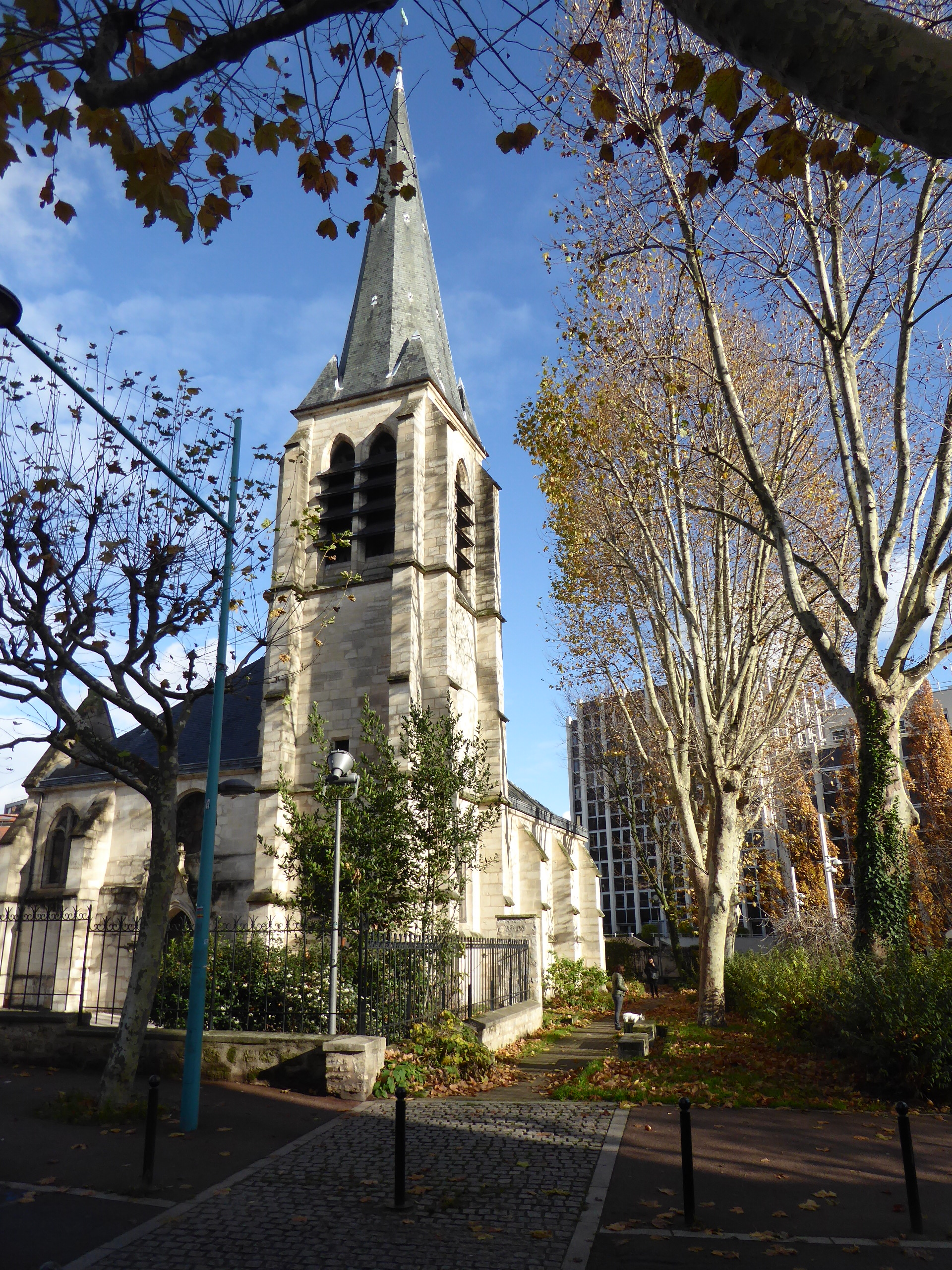 église de Gentilly et ancien passage de la Bièvre recouverte